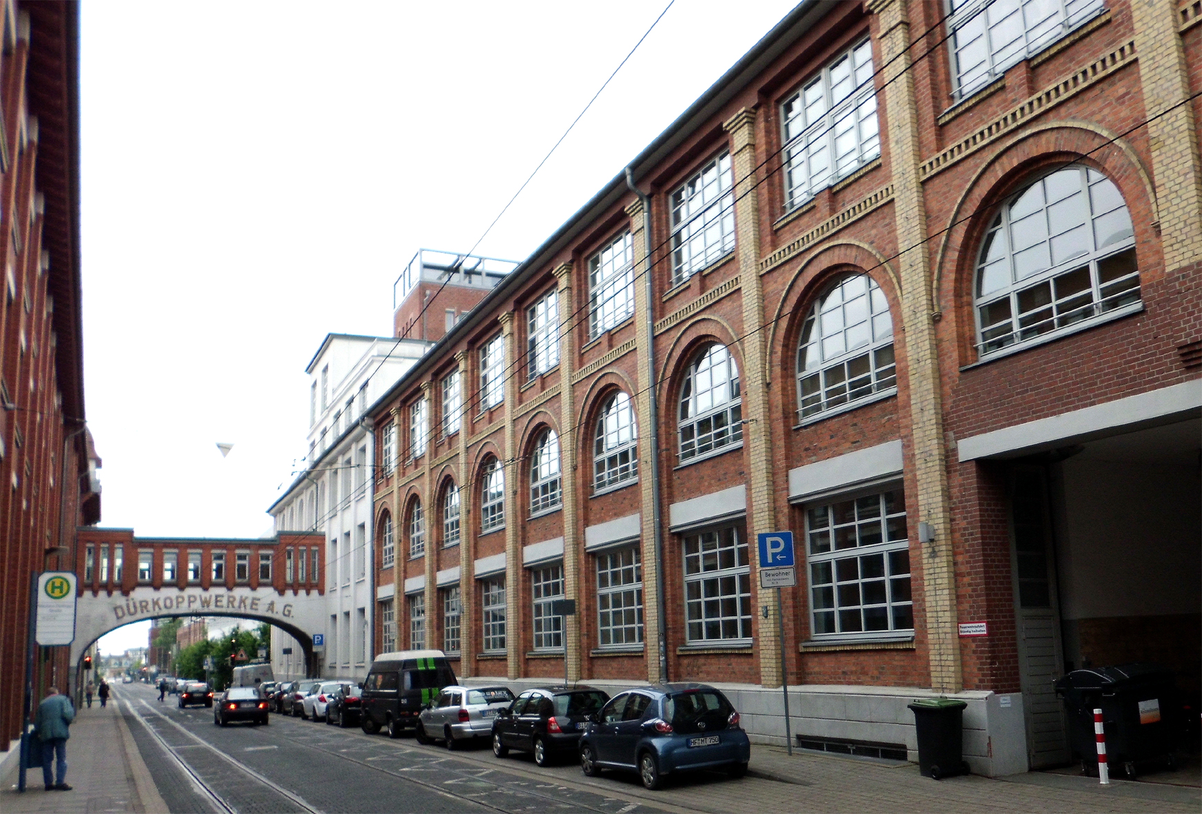 Bielefeld, Denkmalliste 165, ehemaliges Dürkopp-Werk an der Nikolaus-Dürkopp-Straße, Tor 1 aus dem 19. Jahrhundert